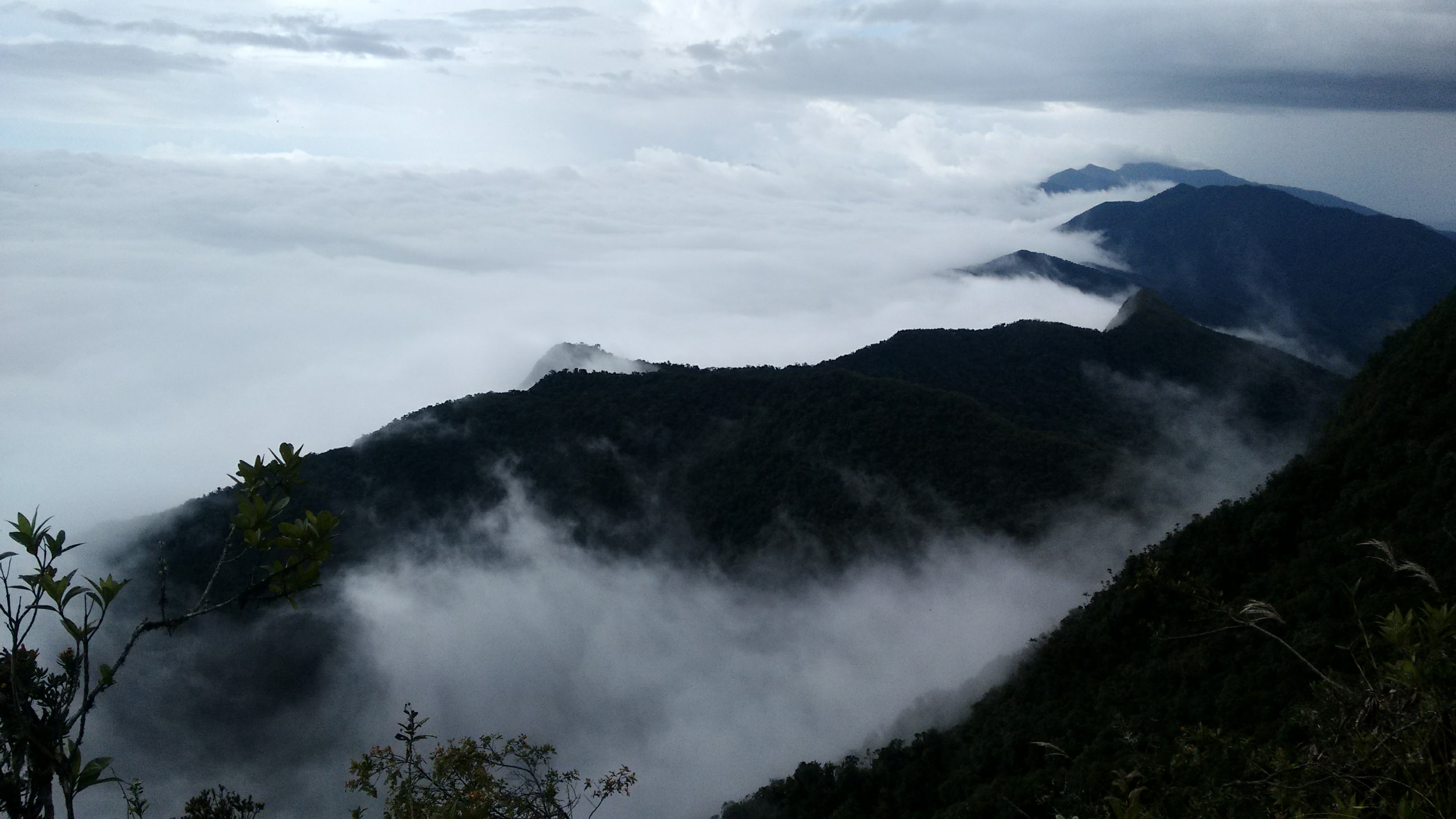 Esta fotografía fue tomada en un área protegida de Colombia con el código 133 del RUNAP.